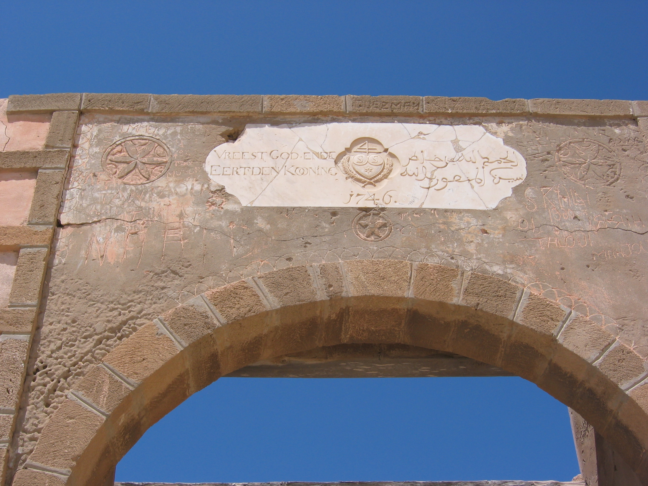 Agadir (Maroc), la porte de l'ancienne Kasbah